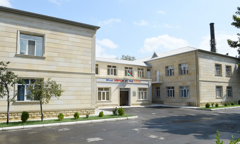 Bakıxanov (qəsəbə) 105 N-li körpələr evi